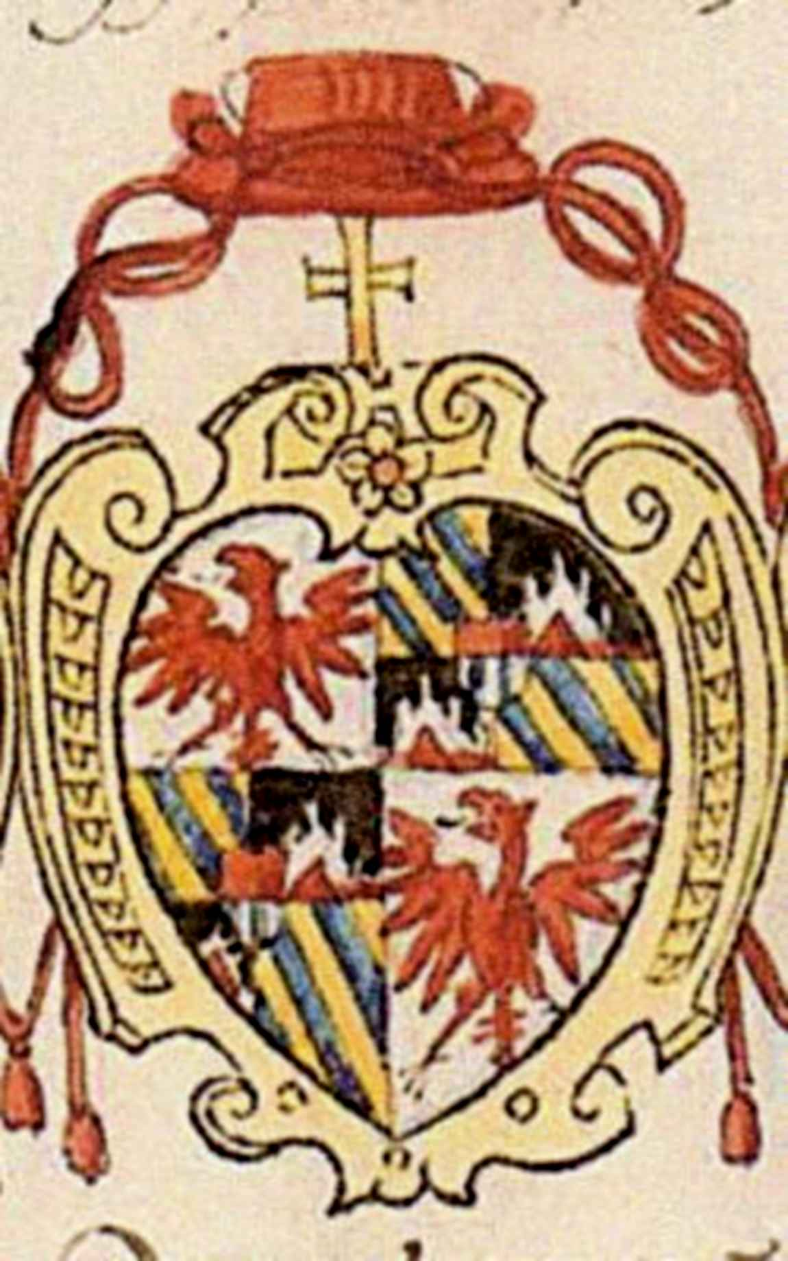 Wappen Kardinal Giovanni Ludovico Madruzzo (1532-1600)